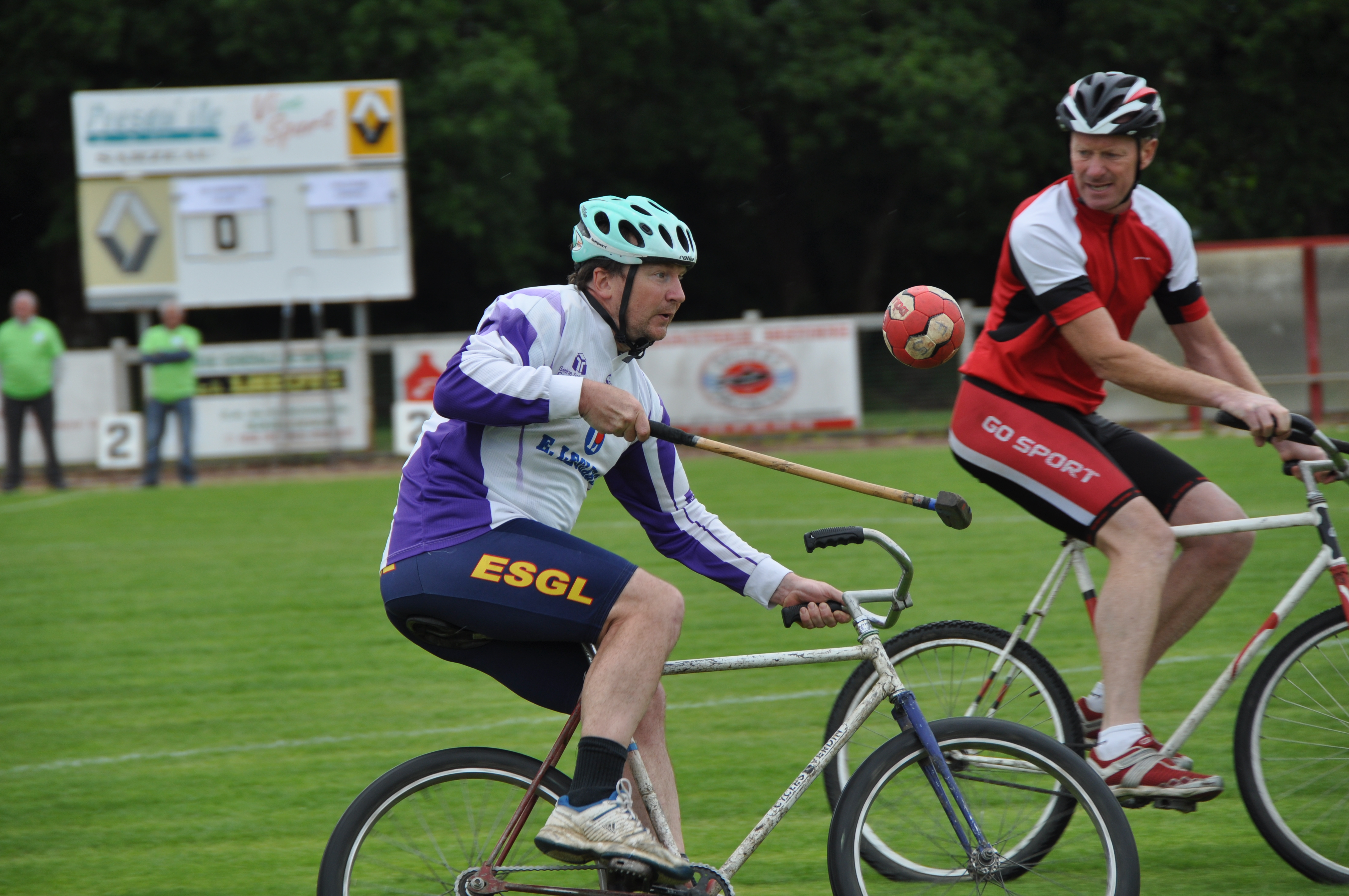 Match du championnat de France 2013 E.S. Gervais-Lilas / V.C. Frileuse-Sanvic.